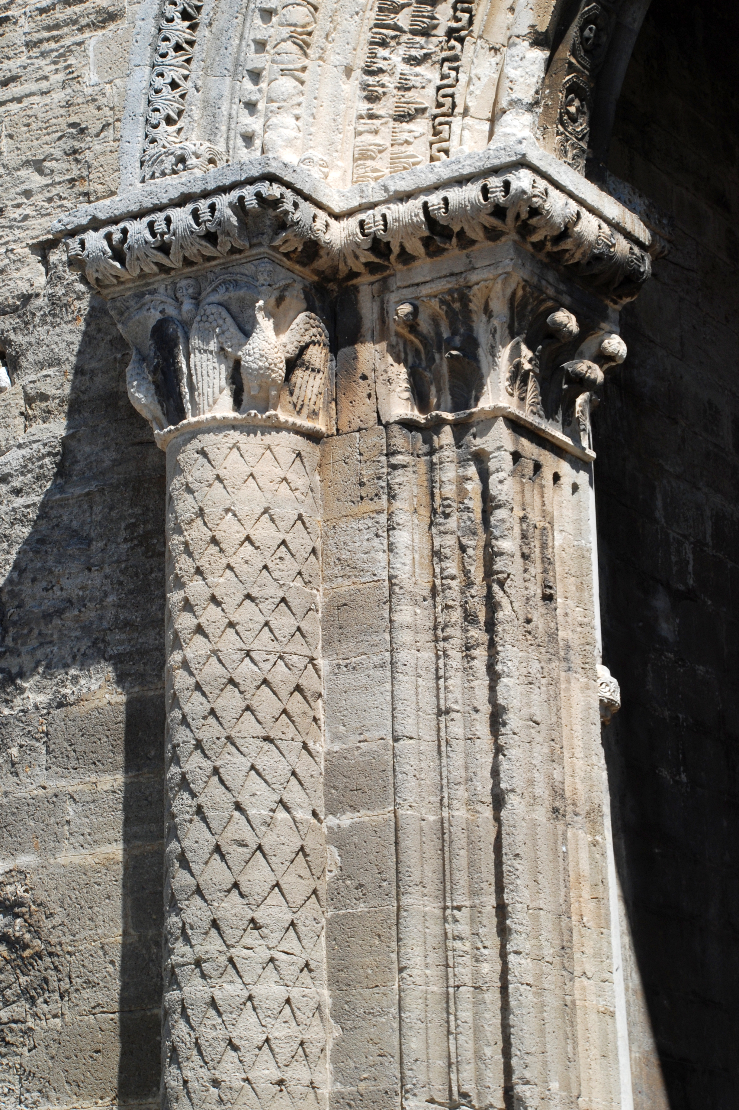 France - Vaucluse - Le Thor - Église Notre-Dame-du-Lac